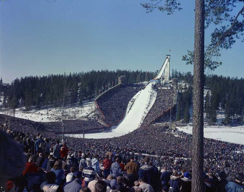 Holmenkollbakken in Oslo, Norway